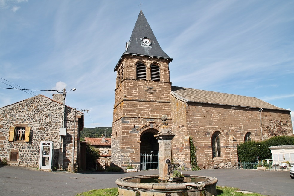 Église Saint-Jean-Baptiste à Saint-Jean-de-Nay (43).